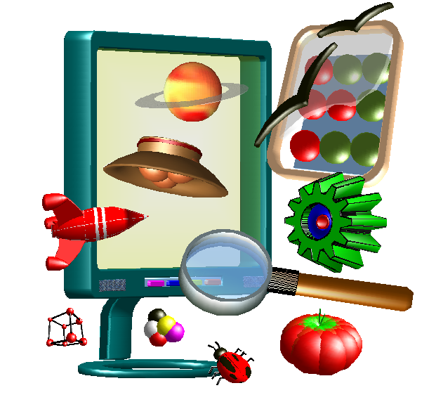 Exemple d'objets 3D